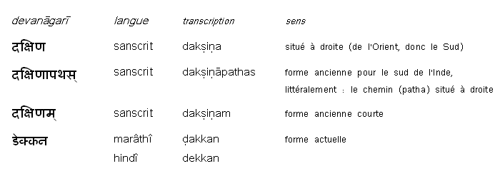 écriture correcte des différents anciens noms du Deccan en devanagari